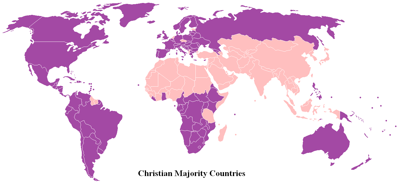 Mise à jour de la carte de Starfunker226 (